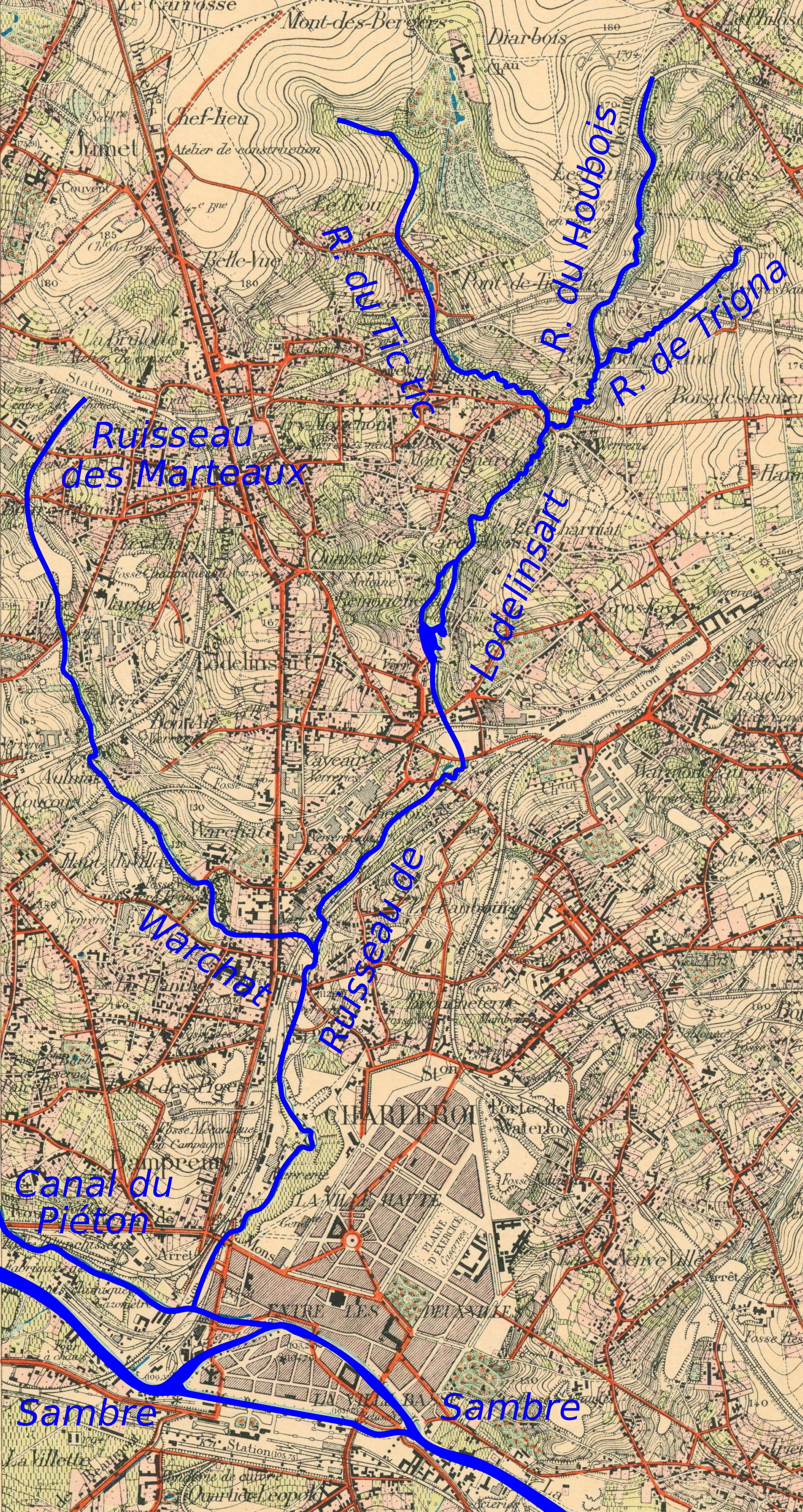 Bassin du ruisseau de Lodelinsart (Charleroi-Belgique). D'après une carte topographique de 1892.